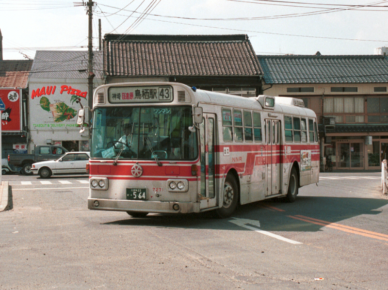 鳥栖駅前にて撮影